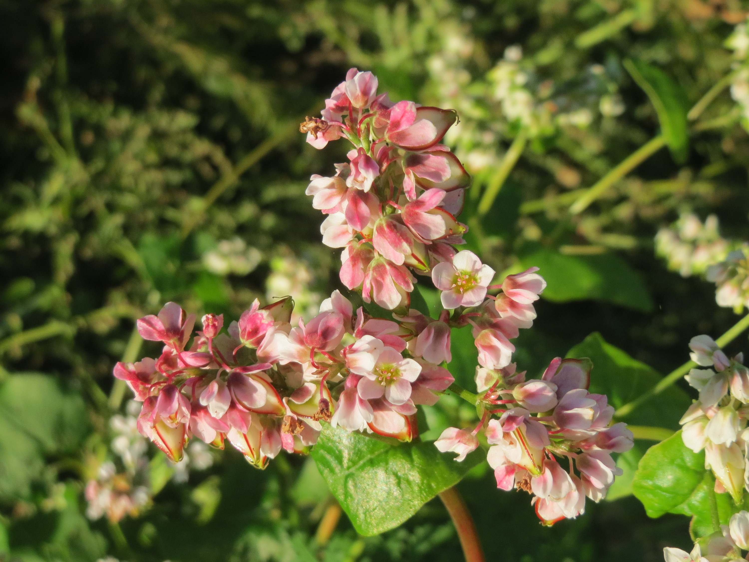 Wohl verwilderter Buchweizen (Fagopyrum esculentum) am Ackerrand bei Reilingen